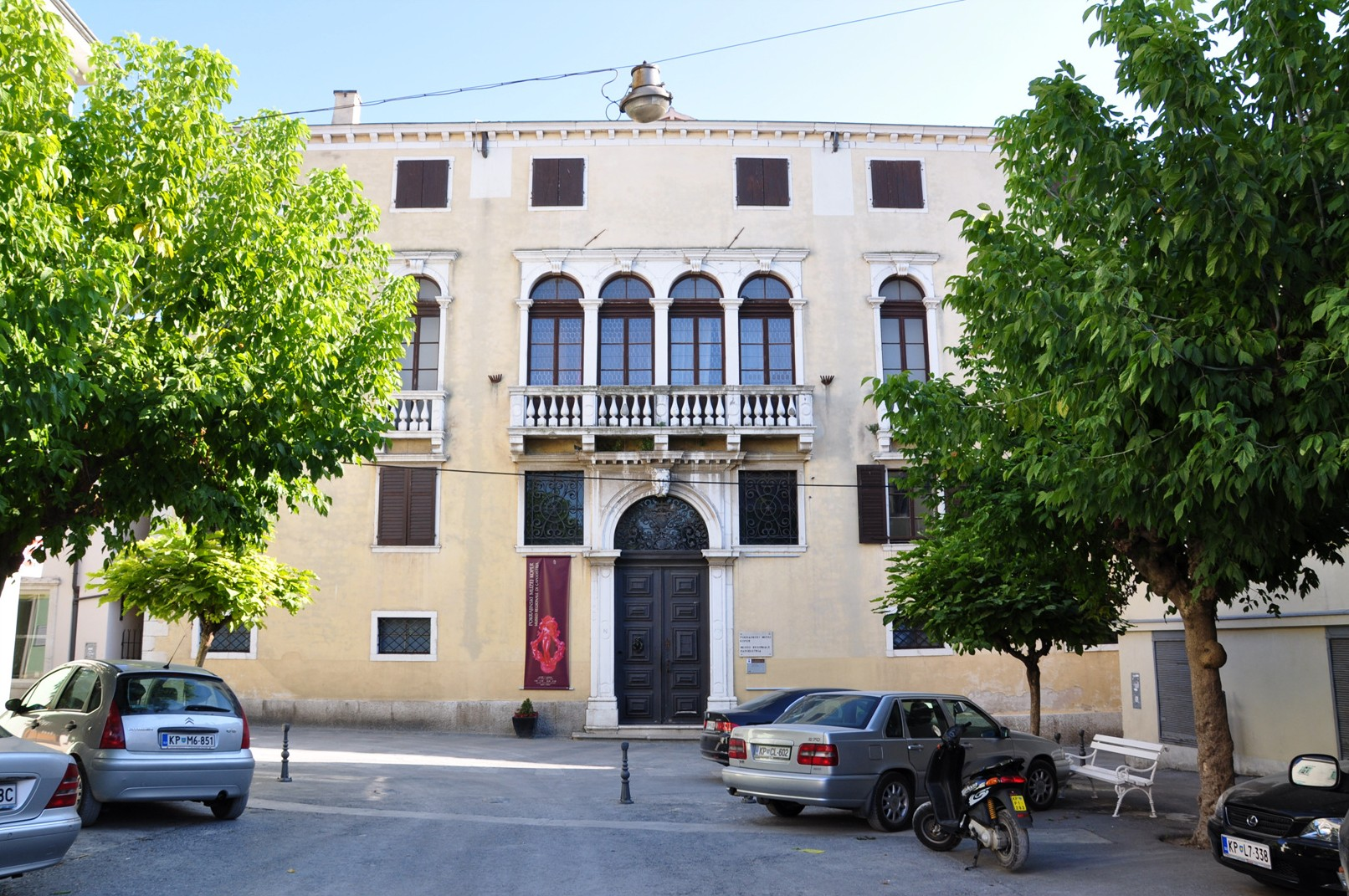 Koper (30)